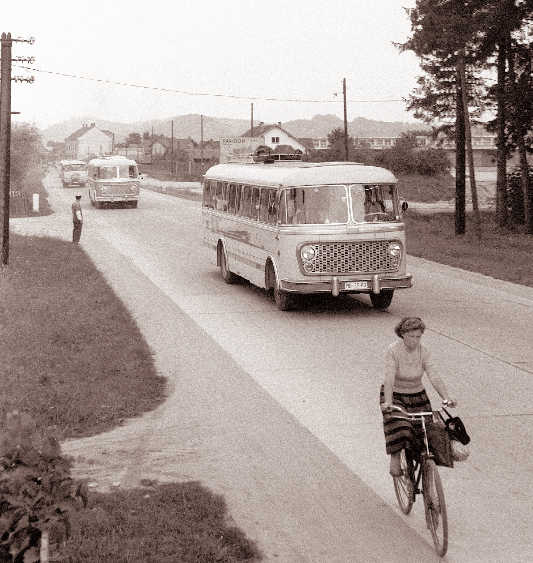 Kolona vozil v Mariboru proti Ljubljani na osrednjo proslavo 20-letnice osvoboditve